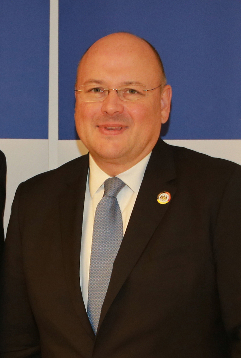 Arne Schönbohm, amtierender Präsident des Bundesamtes für Sicherheit in der Informationstechnik (BSI). Hier während seines Besuches im Internationalen Münchner Presseclub am 17.10.2016. Titel des Werks: "Arne Schönbohm am 17.10.2016 im Münchner Presseclub (Bild-Nr. 9898)". Hinweis: Das Bild wurde bearbeitet. Es wurden Schriftfragmente auf dem blauen Hintergrund entfernt.